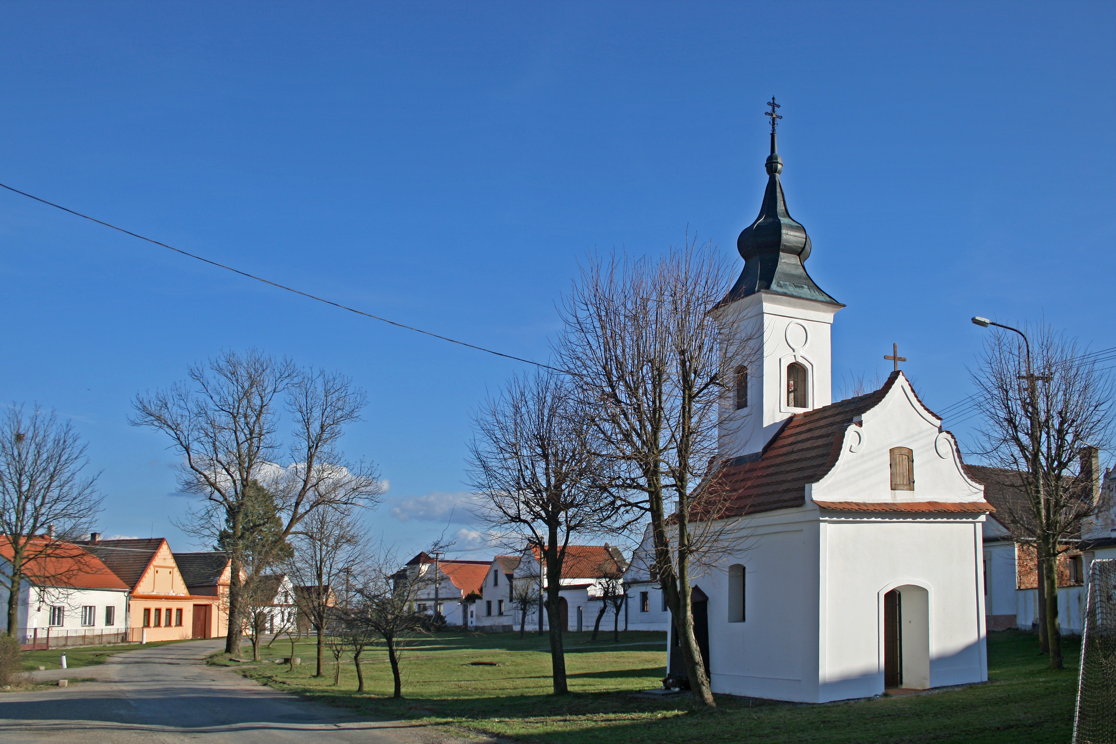 Klečaty - kaple Svaté Trojice